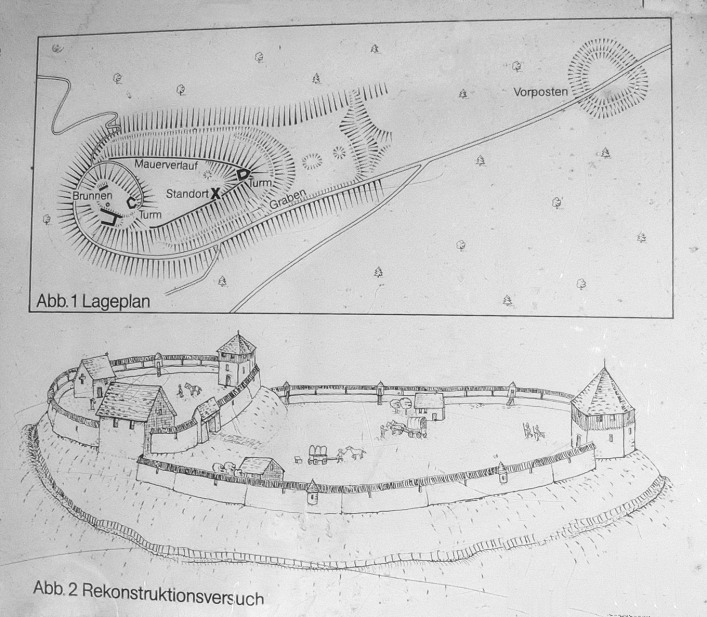 Skizze der Winzenburg an der Burgstelle, öffentlich aufgestellte Tafel